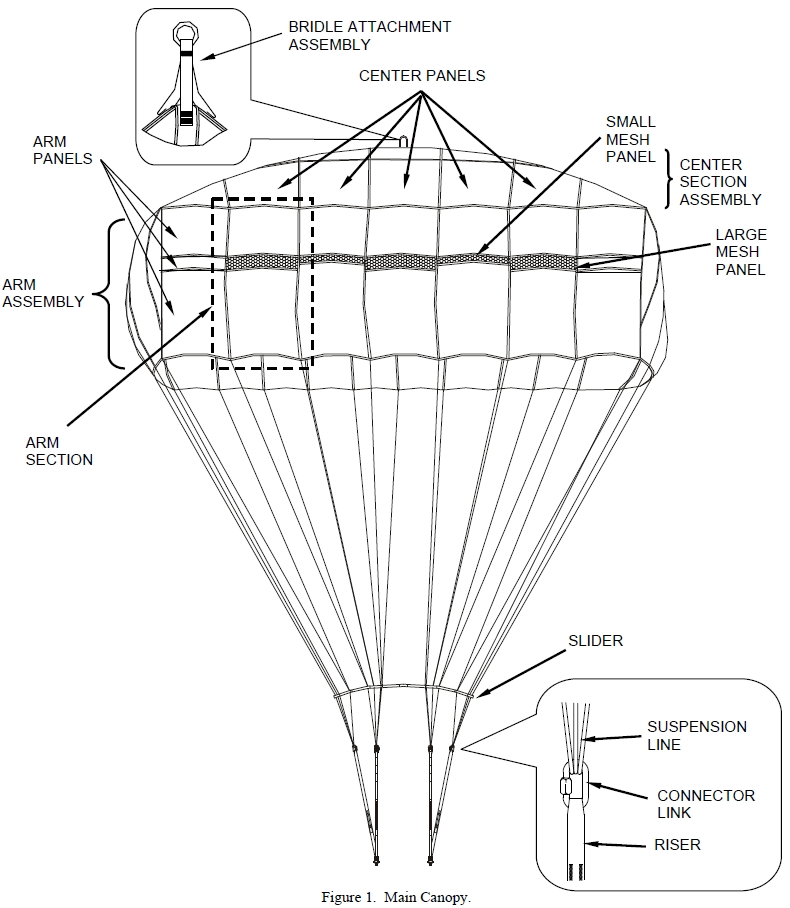 Beschreibung von Fallschirmkappe und Fangleinen des T-11 Hauptfallschirms.